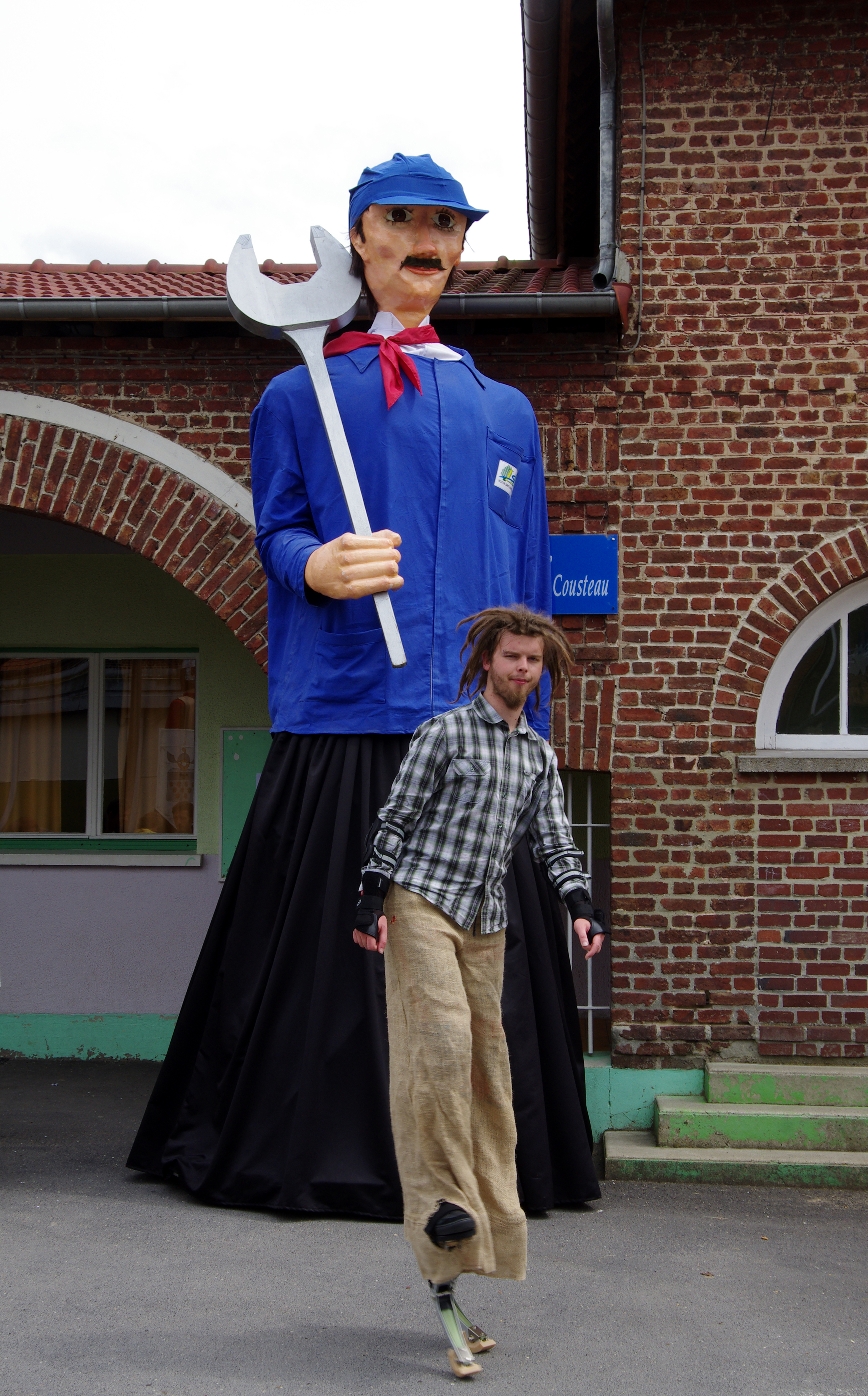 Roclincourt (Pas-de-Calais, France) - Animation festive (dans la cour de l'école) pour le "baptême" du géant local Albert la main verte. Un acrobate sur échasses "se promène" devant l'un des géants de Saint-Laurent-Blangy, Ch' grand Louis (représentant un ouvrier métallurgiste). .